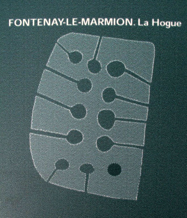 Plan du tumulus de la Hogue à Fontenay le Marmion (Calvados)